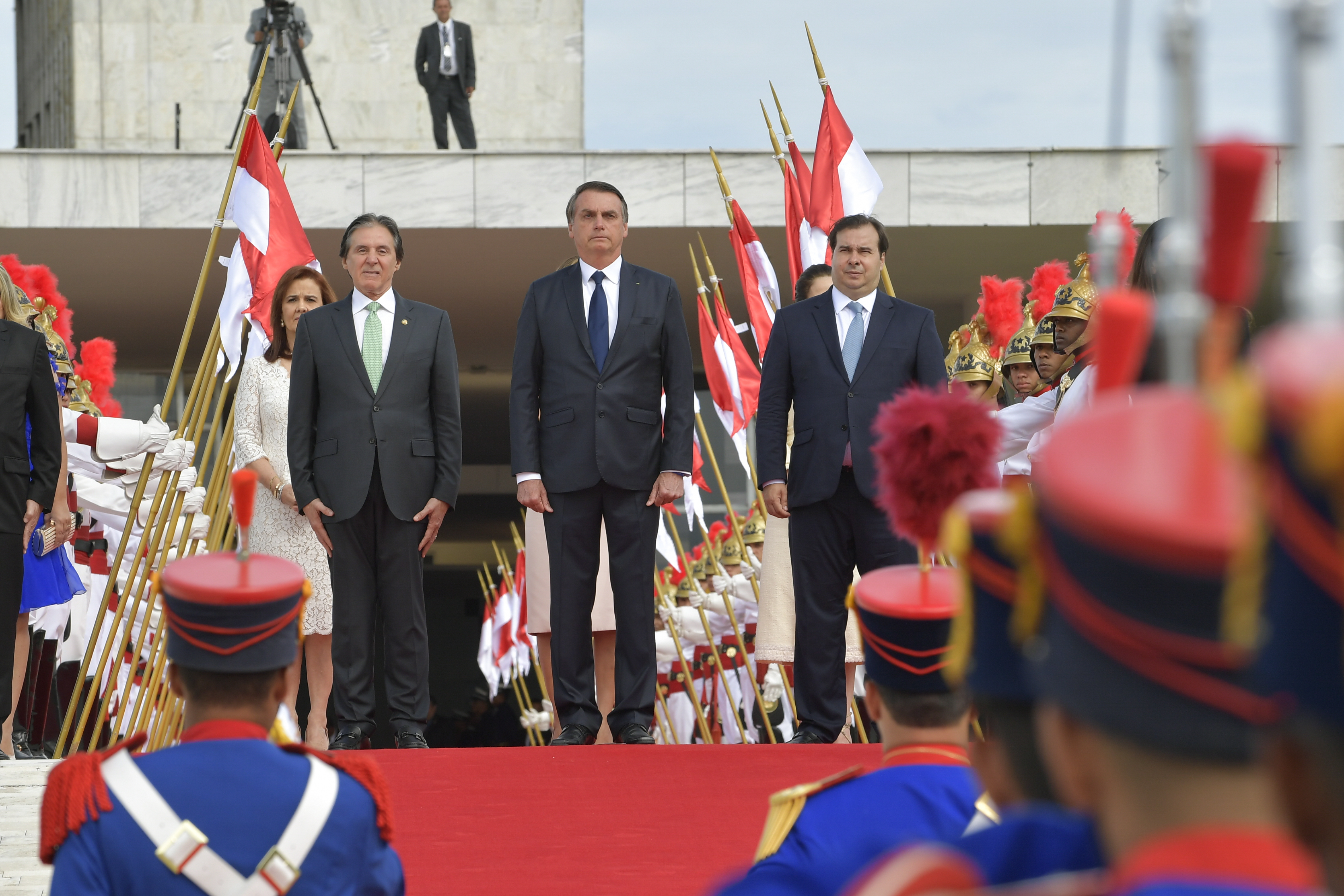 Solenidade de posse do presidente e do vice-presidente da República.Após posse, o presidente da República, Jair Bolsonaro, caminha pelo tapete vermelho em meio a formação de militares.Participam:vice-presidente da República, general Hamilton Mourão;presidente do Senado, senador Eunício Oliveira (MDB-CE);presidente da Câmara dos Deputados, deputado Rodrigo Maia (DEM-RJ).Foto: Jefferson Rudy/Agência Senado